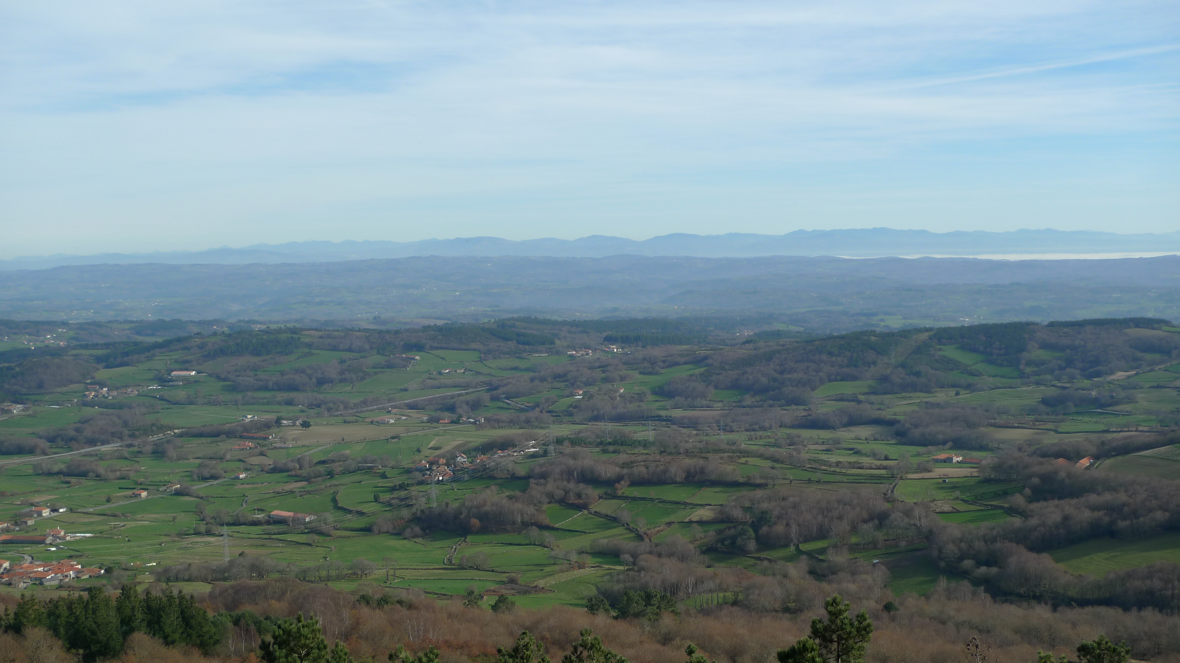 Vista da comarca de Chantada dende o Monte Faro